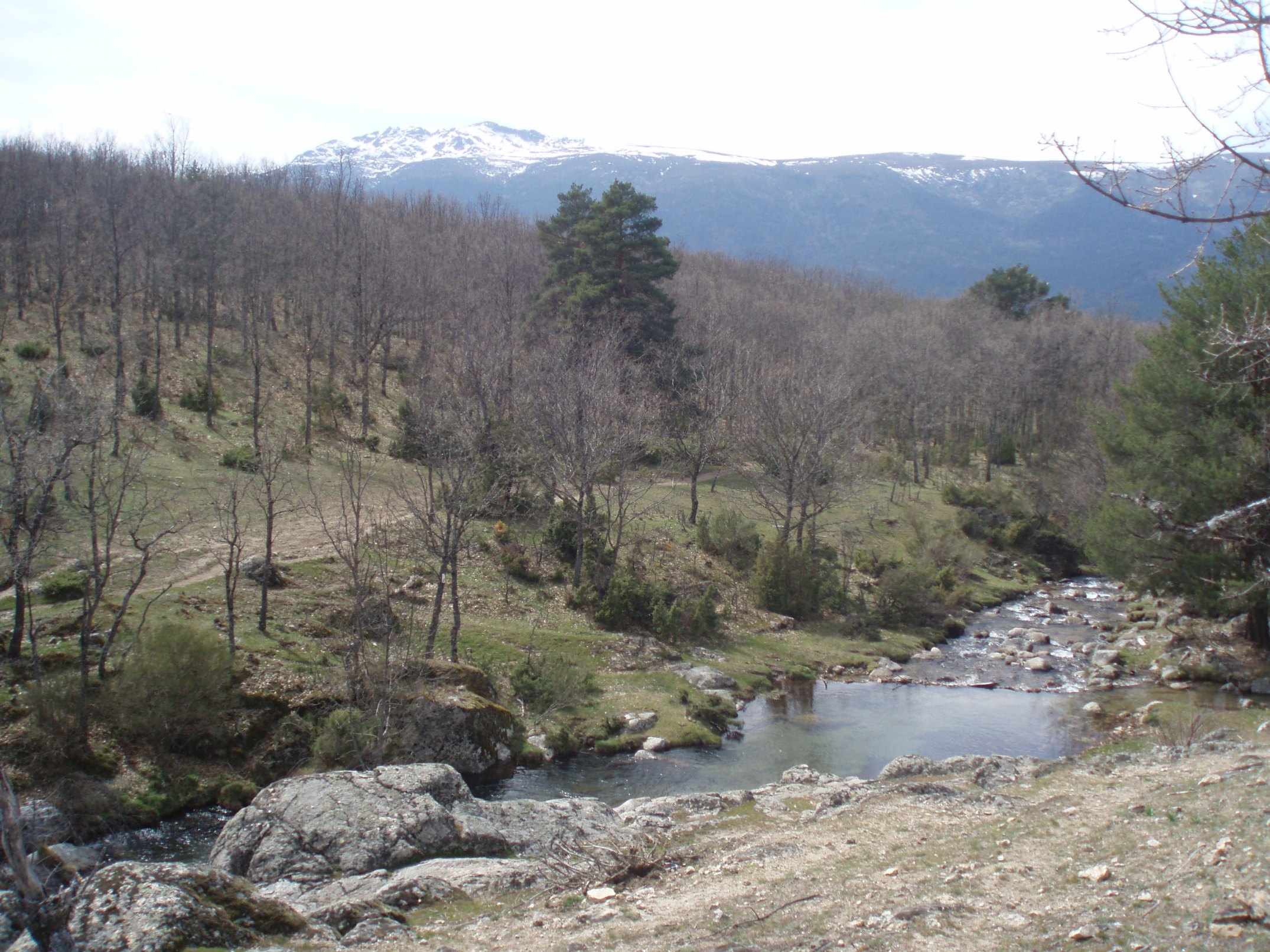 Macizo de Peñalara visto desde el valle del Lozoya con el arroyo del Aguión en primer término (Sierra de Guadarrama, España).